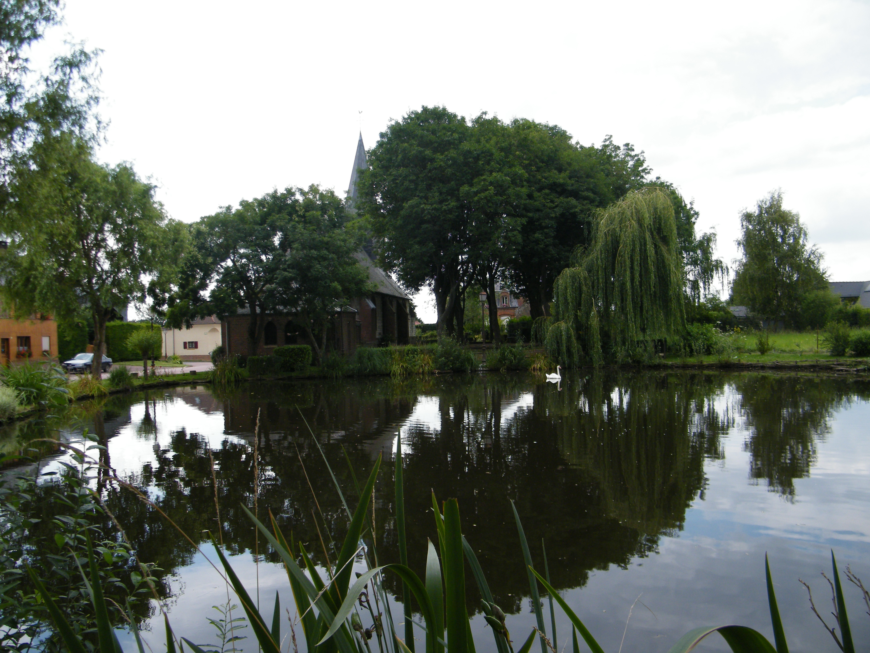 Mare communale, près de l'église.